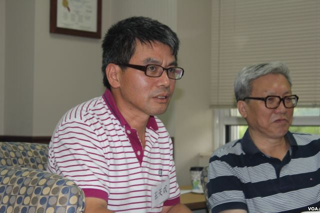 宪政转型学者王天成